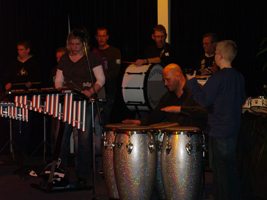 's Avonds mogen alle percussieliefhebbers genieten van Martin Verdonk en de malletband doet een jamsessie samen met Martin Verdonk.